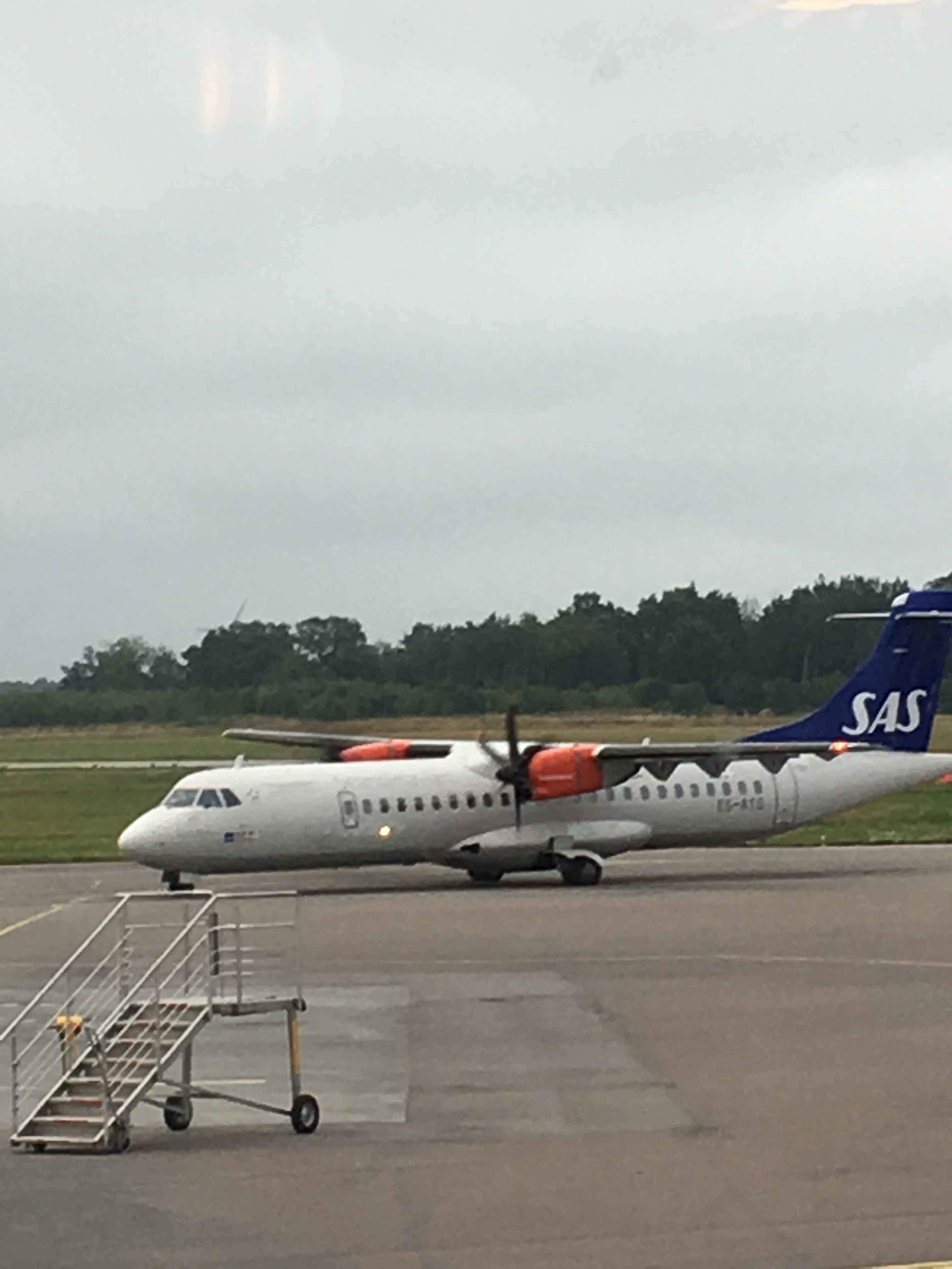 ATR 72 d'sas